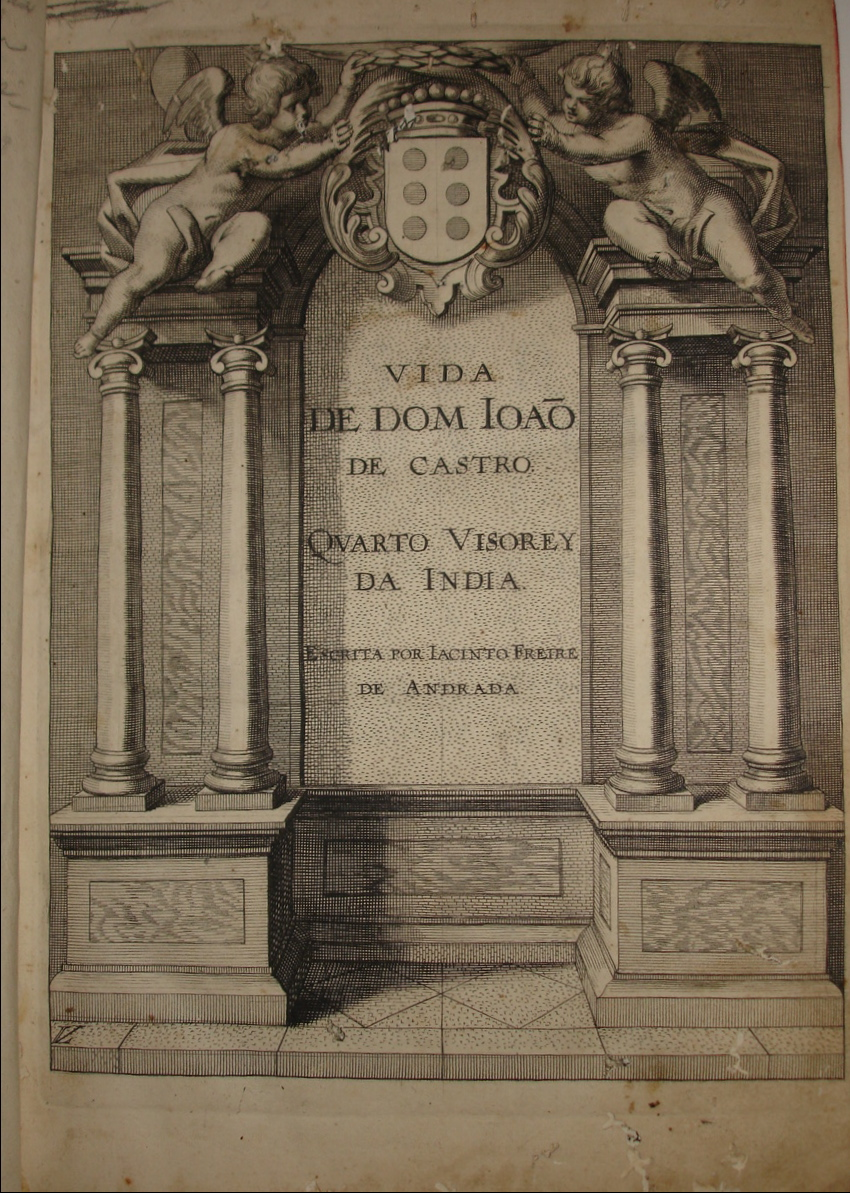 page de titre